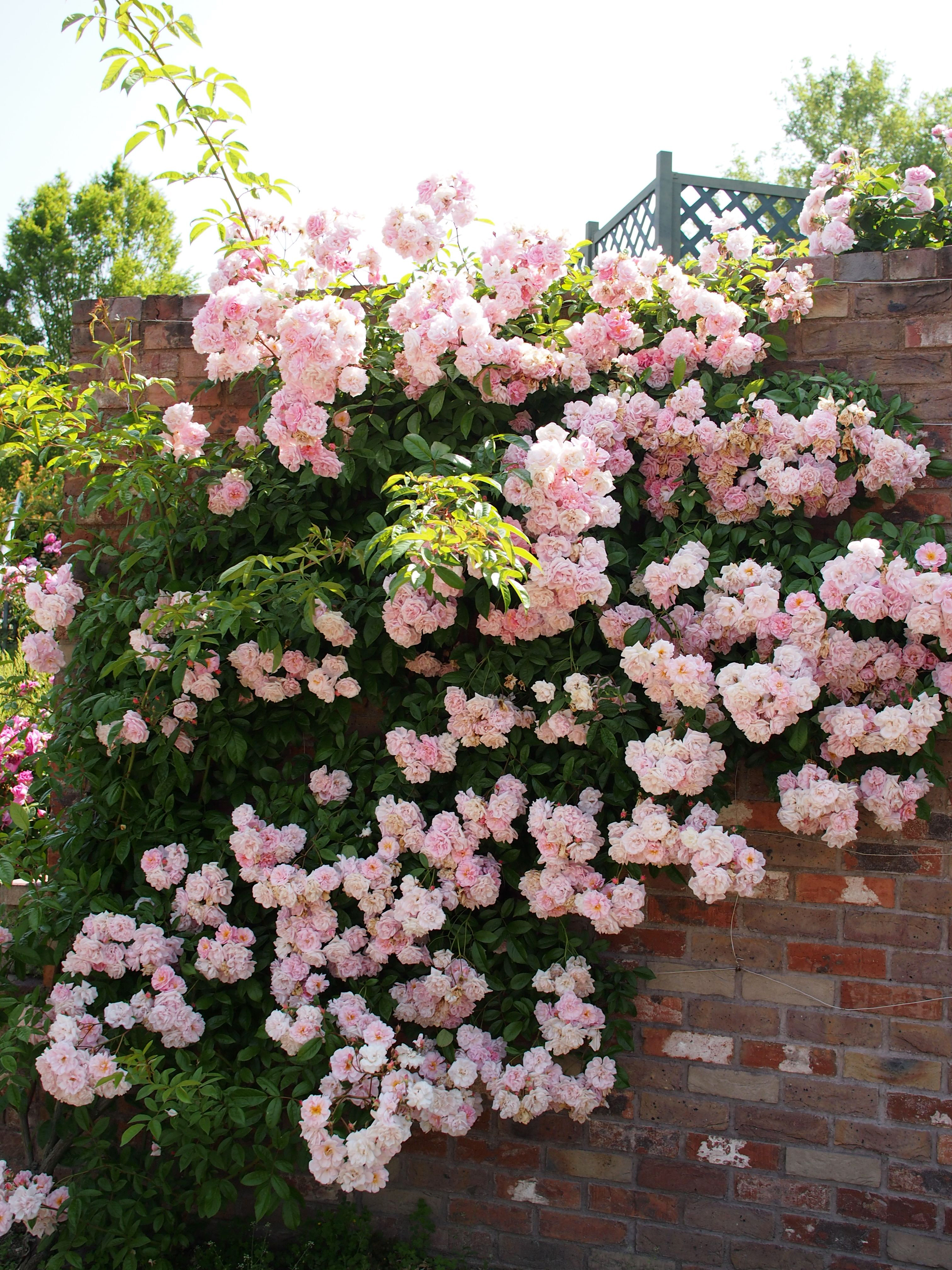 Rose, Tausendschön, バラ, タオゼントシェーン, Old rose(HMult) オールドローズ Germany ドイツ Schmidt 1906